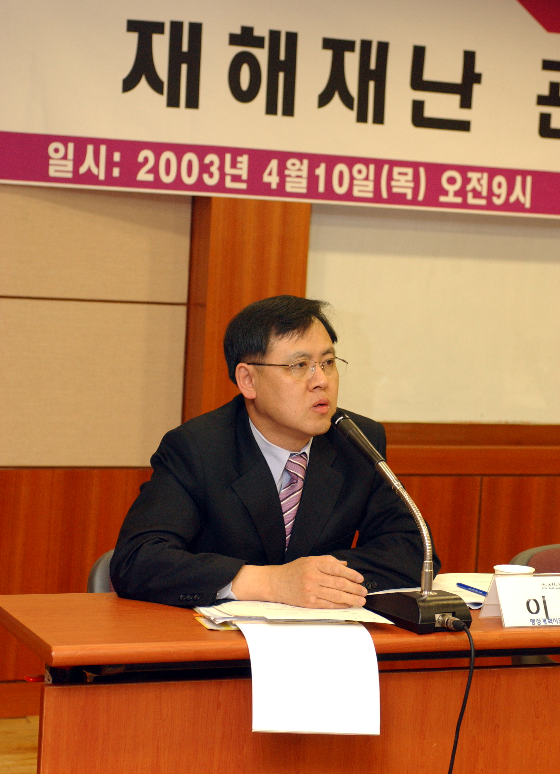 서울특별시 소방재난본부 소장 사진. photos of Seoul Metropolitan Fire & Disaster Headquarters.